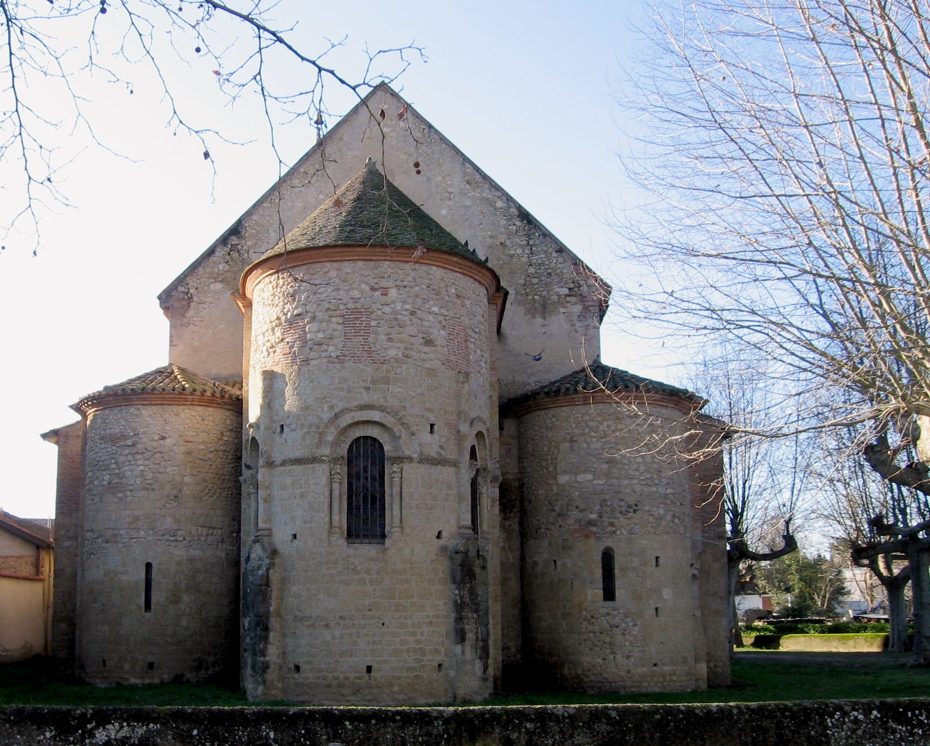 Choeur de l'église de Daumazan sur Arize, dédiée à Saint Saturnin